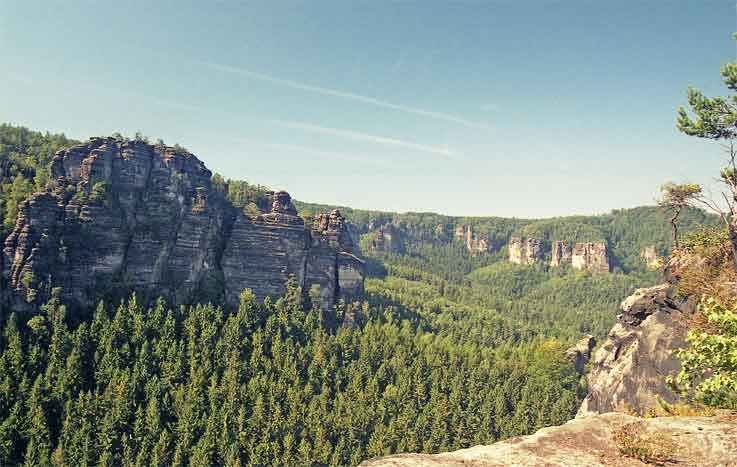 Pohled z vyhlídky Winterstein směrem ke Kleiner Winterberg autor:zp